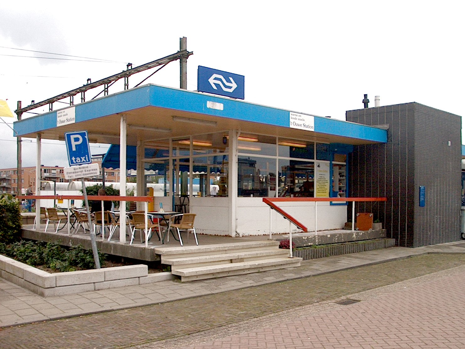 Station Heerhugowaard, Nederland